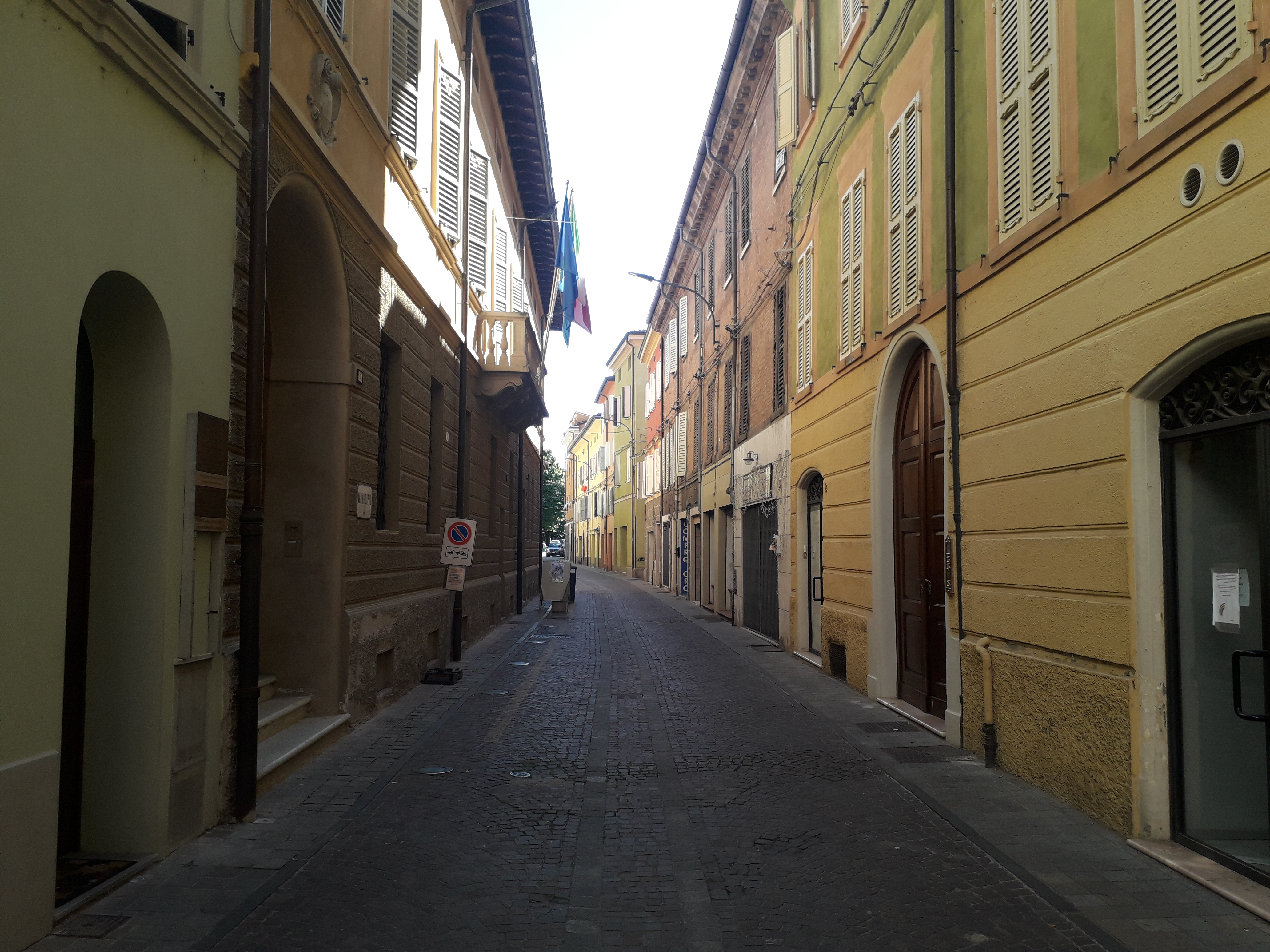 Scorcio di Via Menotti in Sassuolo (MO)